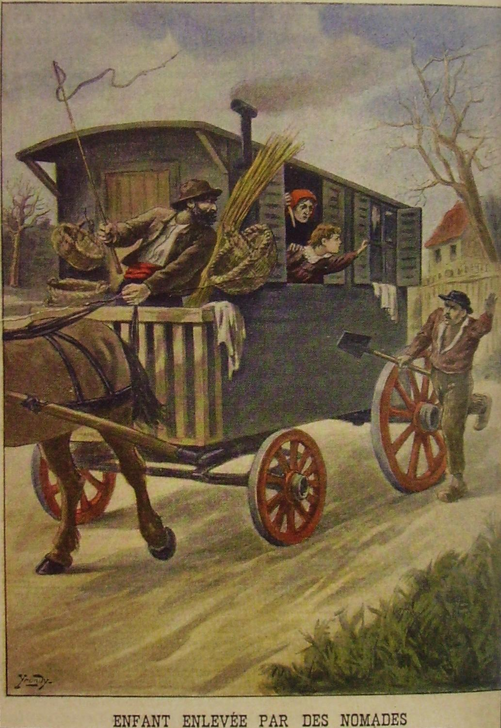 Children stolen by nomads